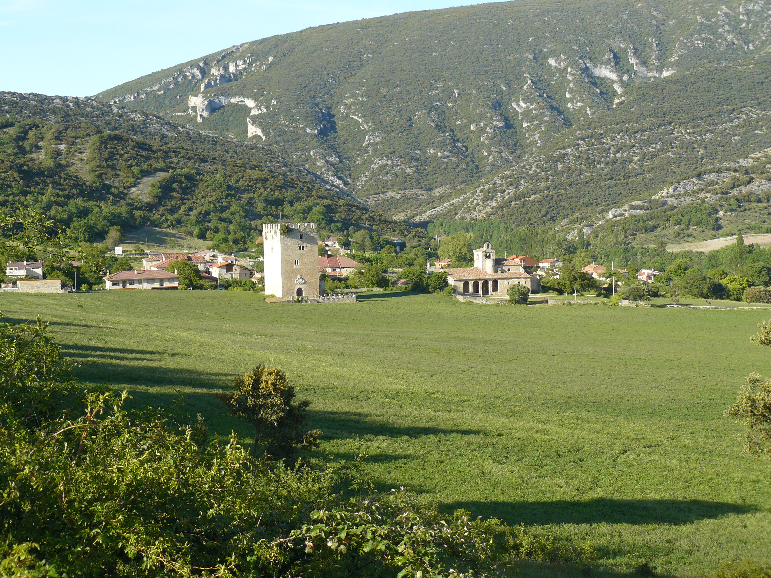 Valdenoceda, Burgos.